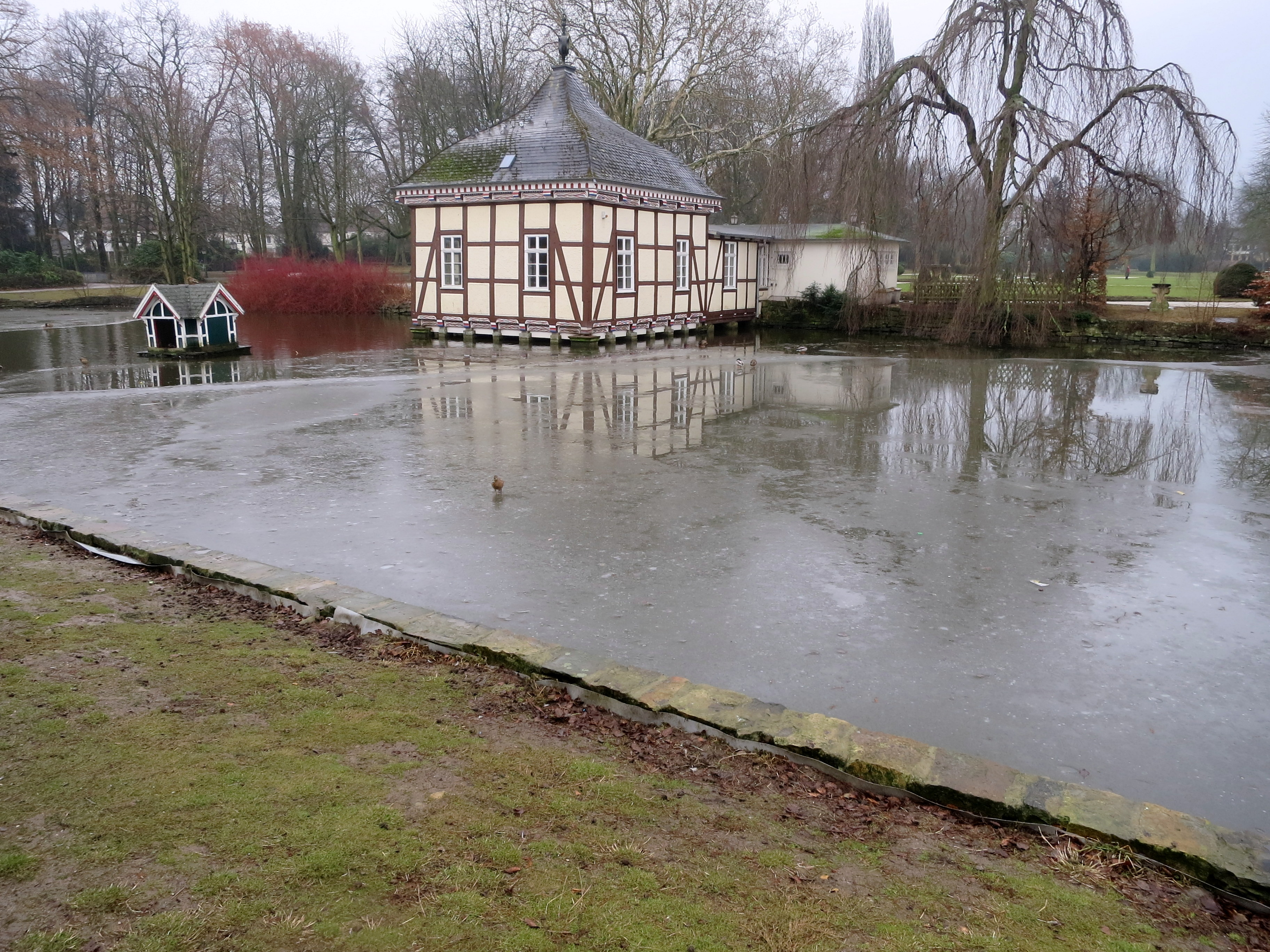 Der Stadtgarten ist im Winter wenig belebt.